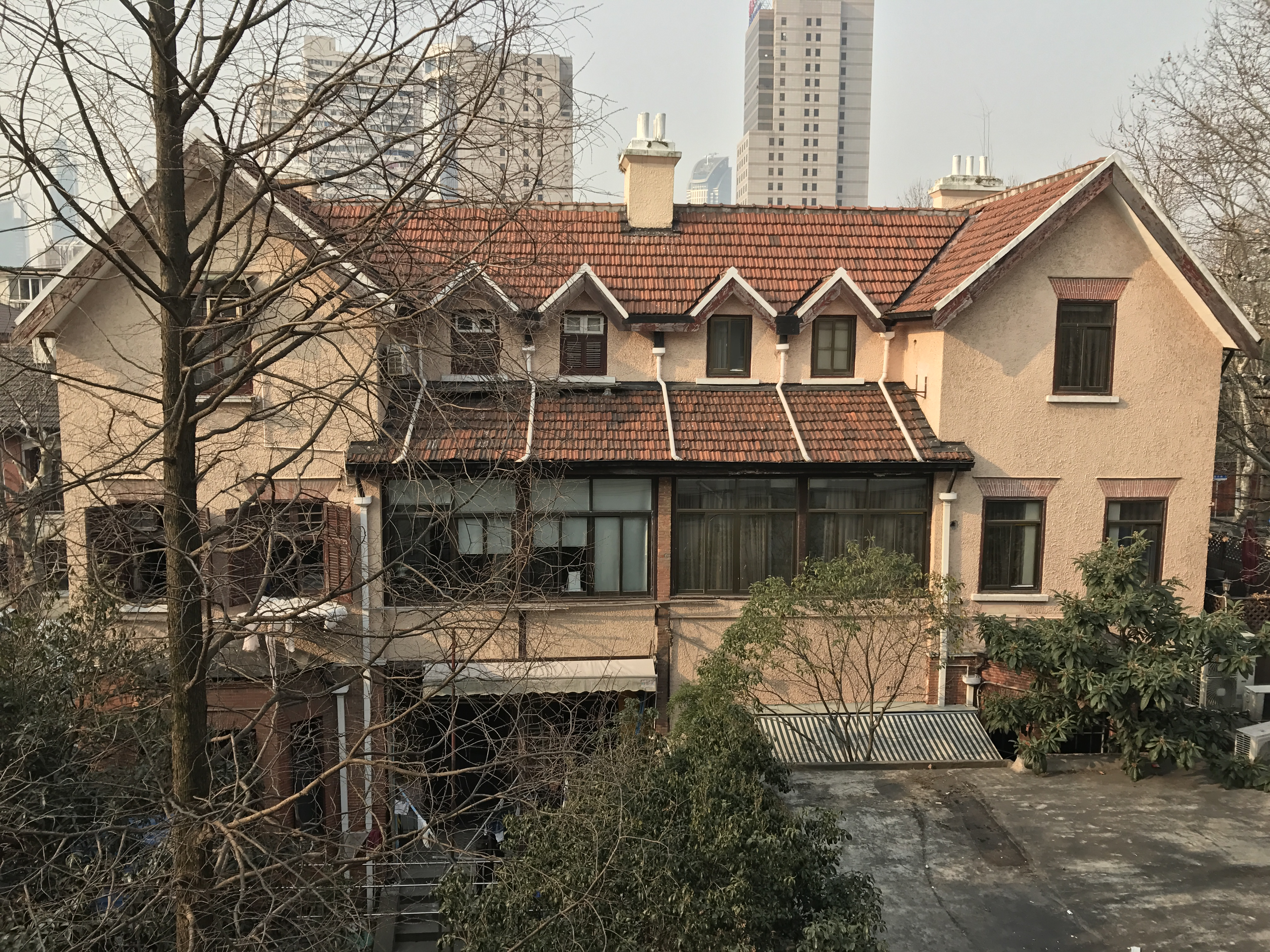 中文（中国大陆）: 大韩民国临时政府诞生地旧址 瑞金二路50号